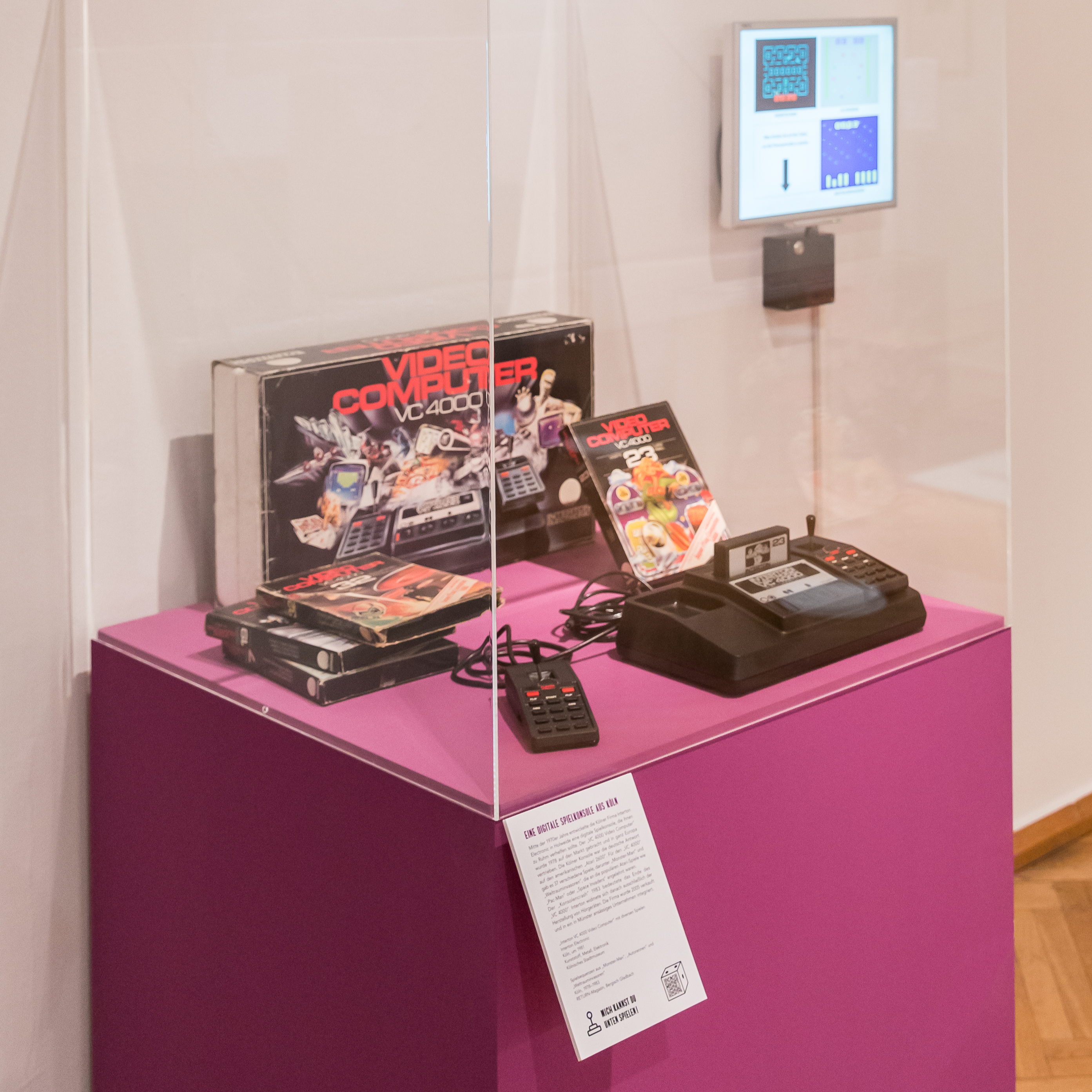 Ausstellung im Kölnischen Stadtmuseum: „Bretter, die die Welt bedeuten. Spielend durch 2000 Jahre Köln“